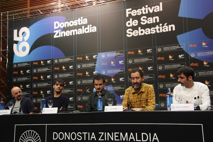 Handia filmaren lantaldearen prentsaurrekoa.